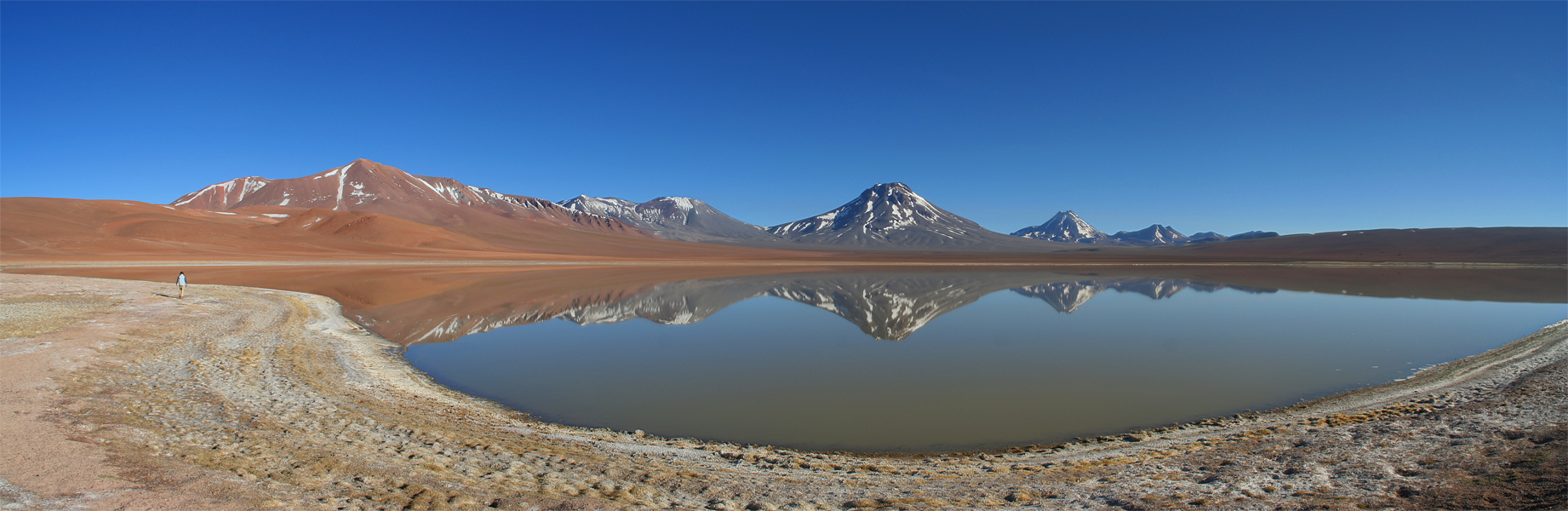 Chile, Laguna Lejia, Lascar, Cerro Aguas Calientes, Cerro Acamarachi